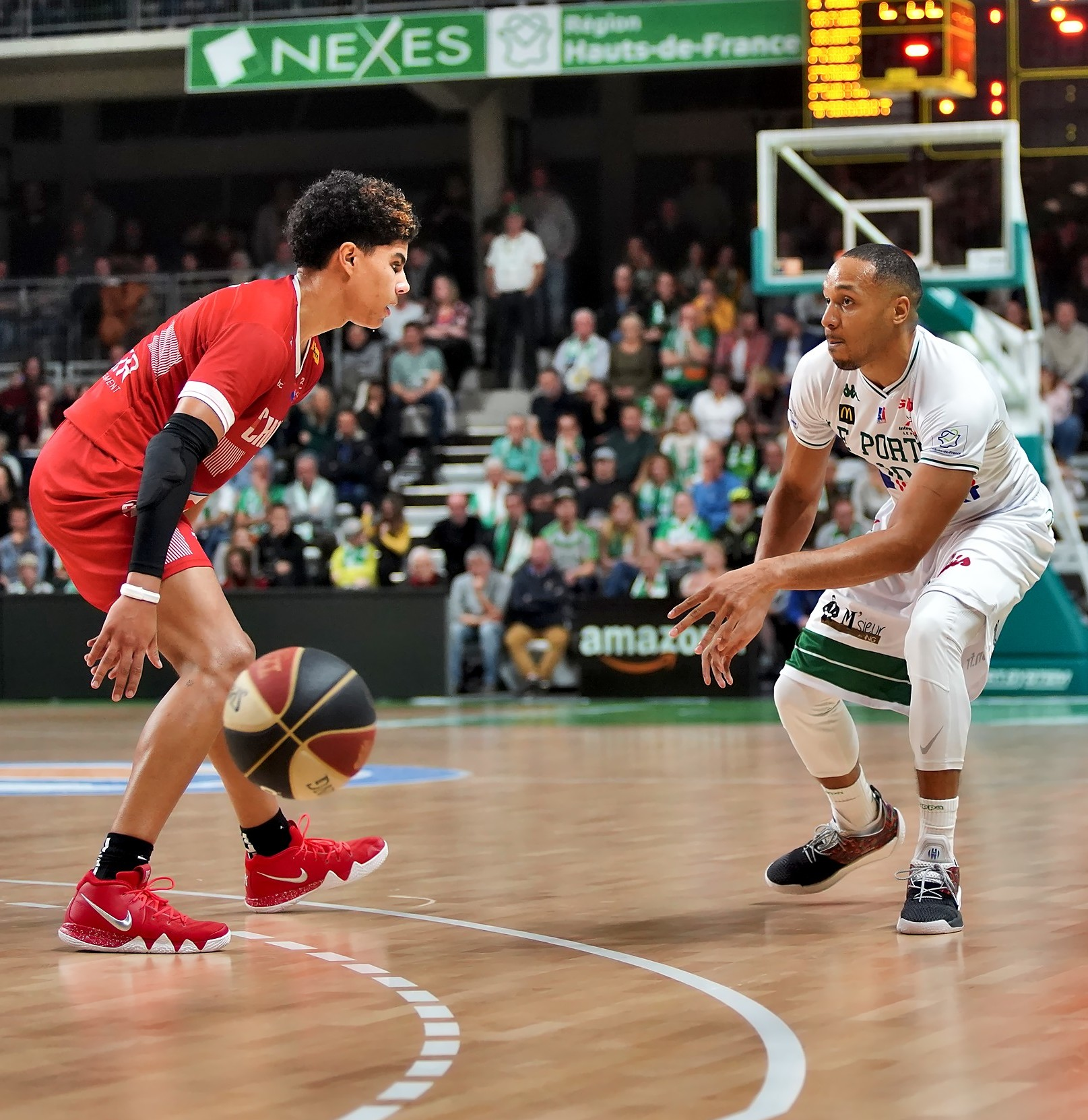 ODN02582